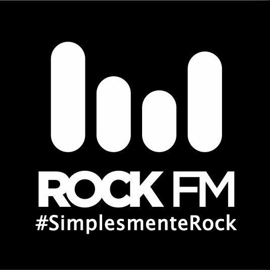 Logo da emissora